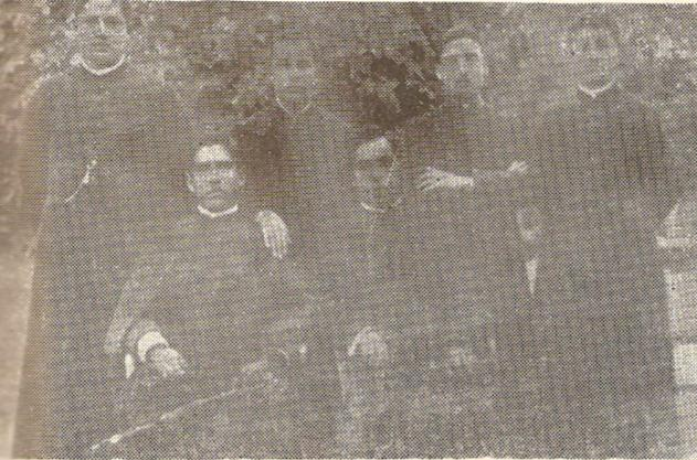 Sacerdotes expulsados de Tacna y Arica por las autoridades de ocupación chilena. De izquierda a derecha sentados: José M. Florez Mextre y J. Vitaliano Berroa, párroco de Tacna y Arica respectivamente. De pie: Francisco Quiroz, Teniente Cura de Tacna; Juan Indacochea Zevalloz, Cura de Codpa; José Felix Cáceres, Cura de Tarata; Juan G. Guevara, Auxiliar de la Parroquia de Arica.-1910